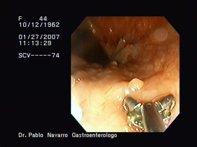 Momento de toma de una biopsia endoscópica en colon, se observa un pequeño pólipo listo para ser biopsiado. La pinza de biopsia está abierta y en dirección al pólipo. Seguidamente se adelantó la posición y se cerró la pinza con lo que se capturó la muestro por completo.